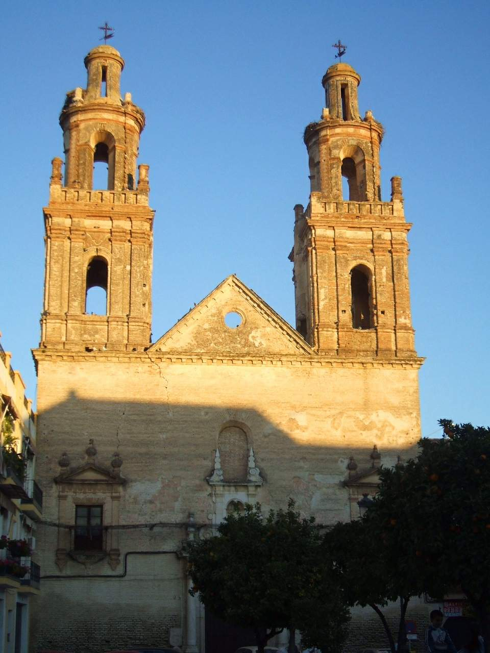 Iglesia de la Concepción Franciscana (Écija)